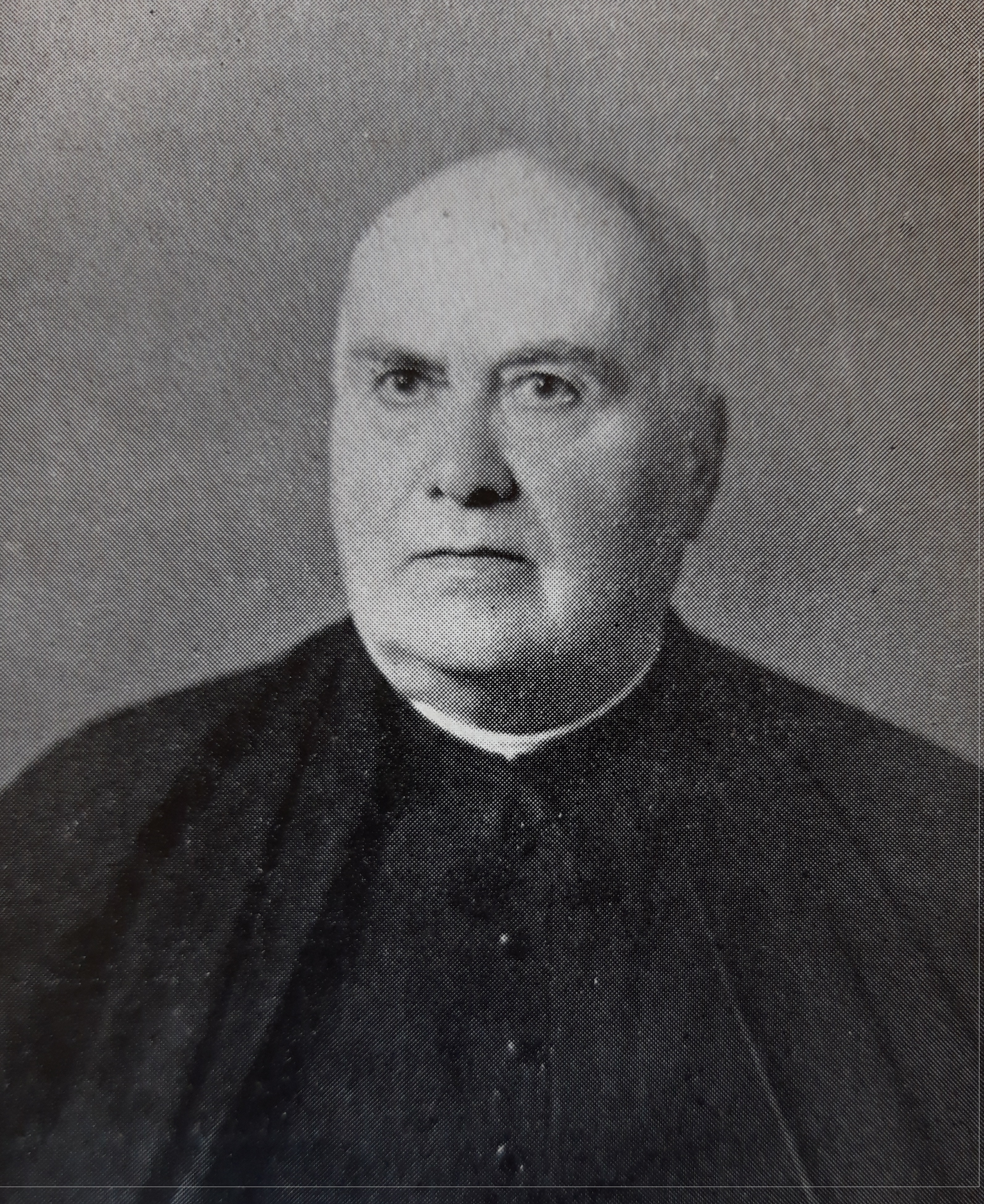 Joan Serra i Vilaró als darrers anys de la seva vida. Dècada de 1960.